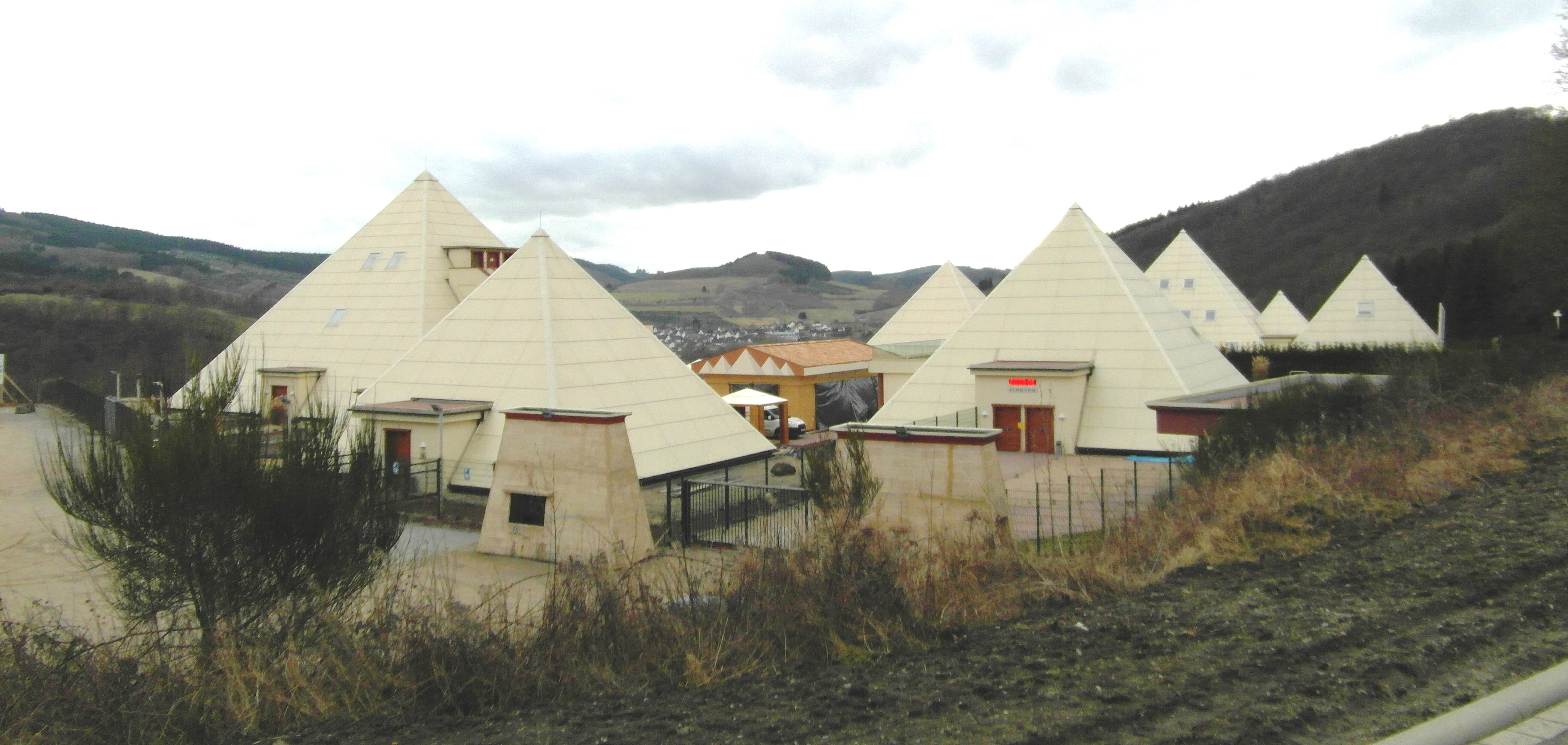 Innovative Bauten in Meggen. Die gewerbliche Nutzung der Sauerlandpyramiden umfaßt den Betrieb eines Wissensparks, Ausbildung von Heilpraktikern und die Herstellung biomedizinischer Geräte